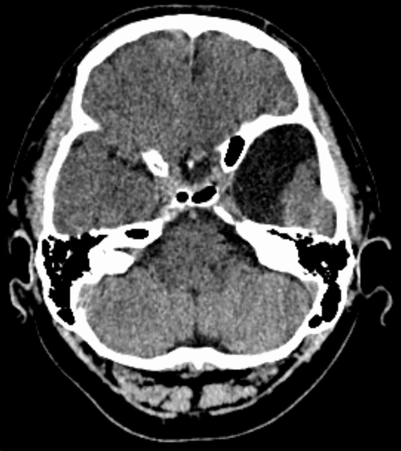 Temporale Arachnoidalzyste links an typischer Stelle. Computertomographie axial.